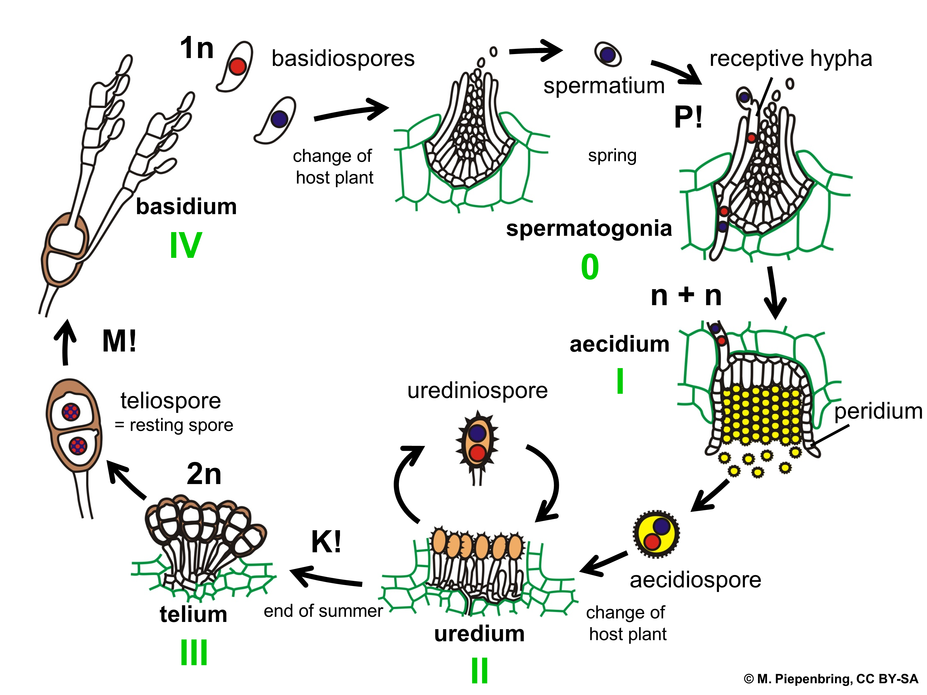 Biologische Schemata, gezeichnet und freigegeben von M. Piepenbring